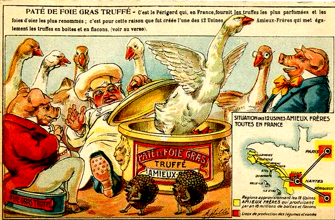 Paté de foie gras truffé